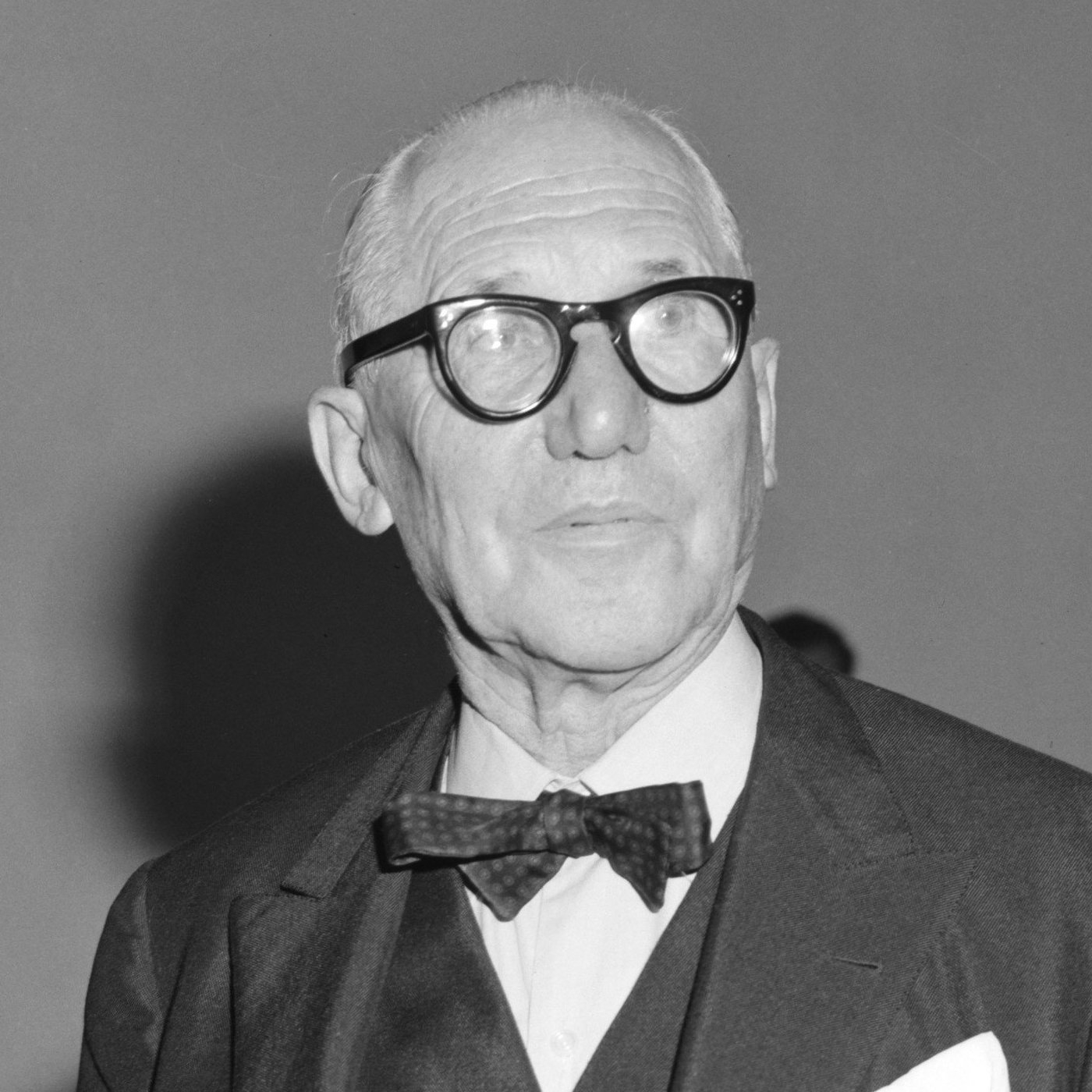 Collectie / Archief : Fotocollectie Anefo Reportage / Serie : [ onbekend ] Beschrijving : Le Corbusier. In Stedelijk Museum Sikkensprijzen uitgereikt, Livinus van de Bundt Datum : 26 september 1964 Trefwoorden : Musea, prijzen, uitreikingen Instellingsnaam : Sikkensprijs Fotograaf : Bilsen, Joop van / Anefo Auteursrechthebbende : Nationaal Archief Materiaalsoort : Negatief (zwart/wit) Nummer archiefinventaris : bekijk toegang 2.24.01.04 Bestanddeelnummer : 916-9288